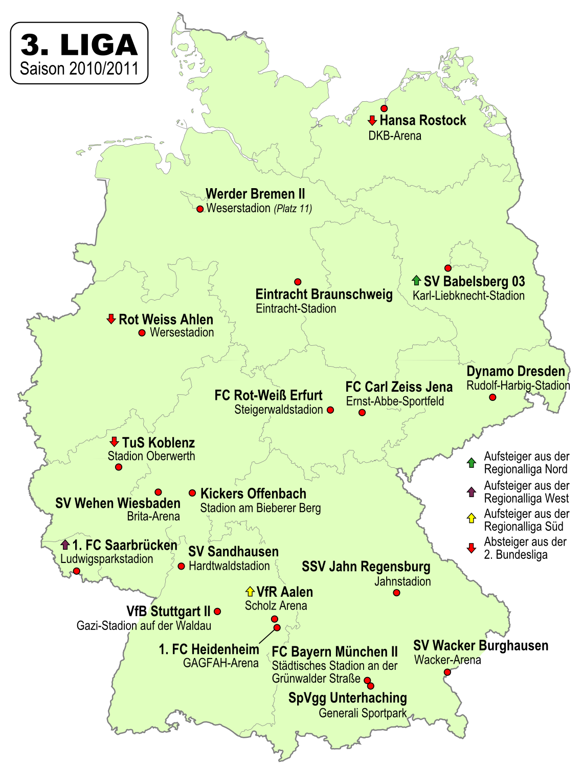 Karte der Vereine der 3. Fussball-Liga 2010/2011